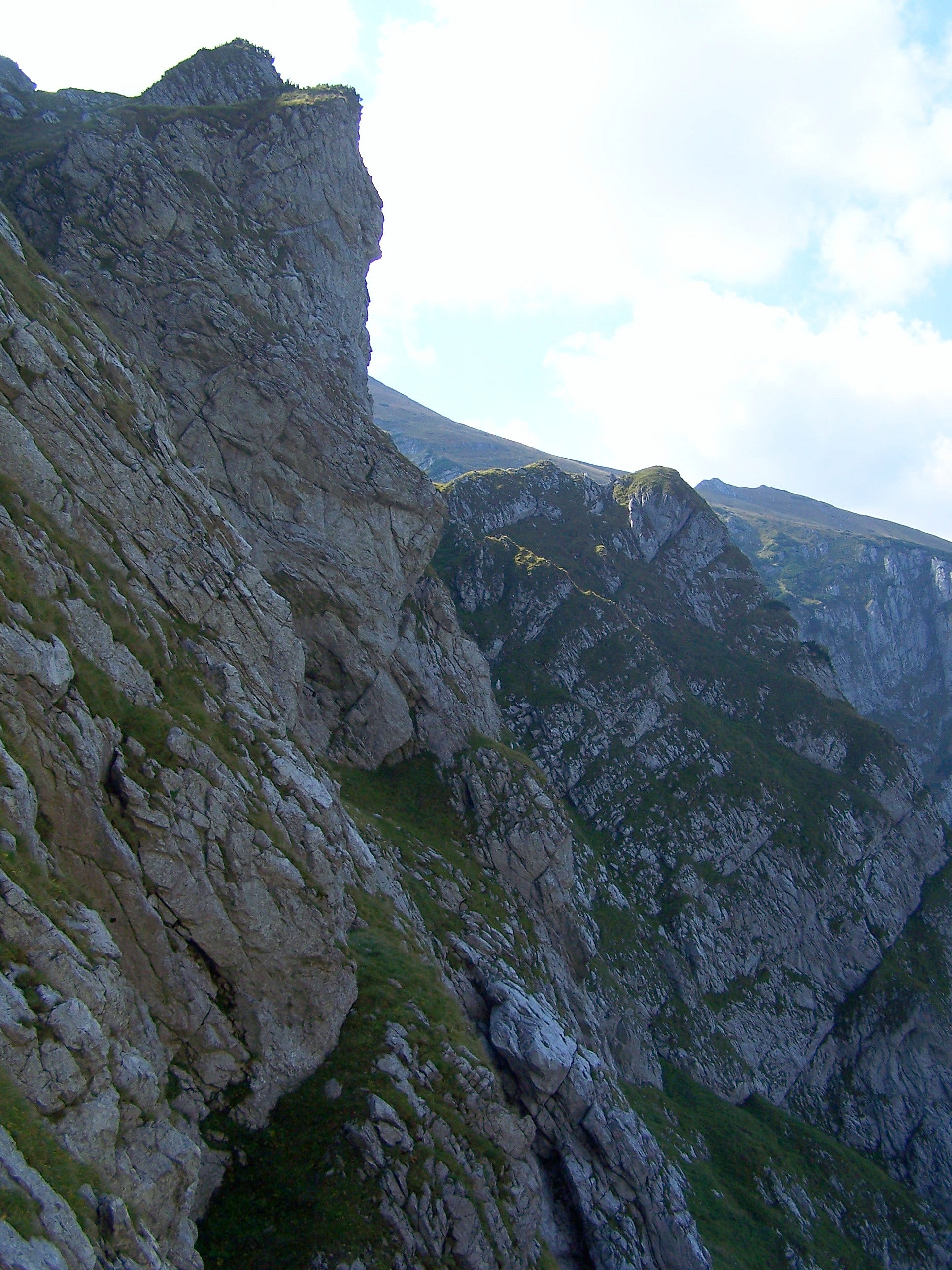 Z lewej strony Ratusz Litworowy, w środku Próg Litworowy i Ratusz Mułowy